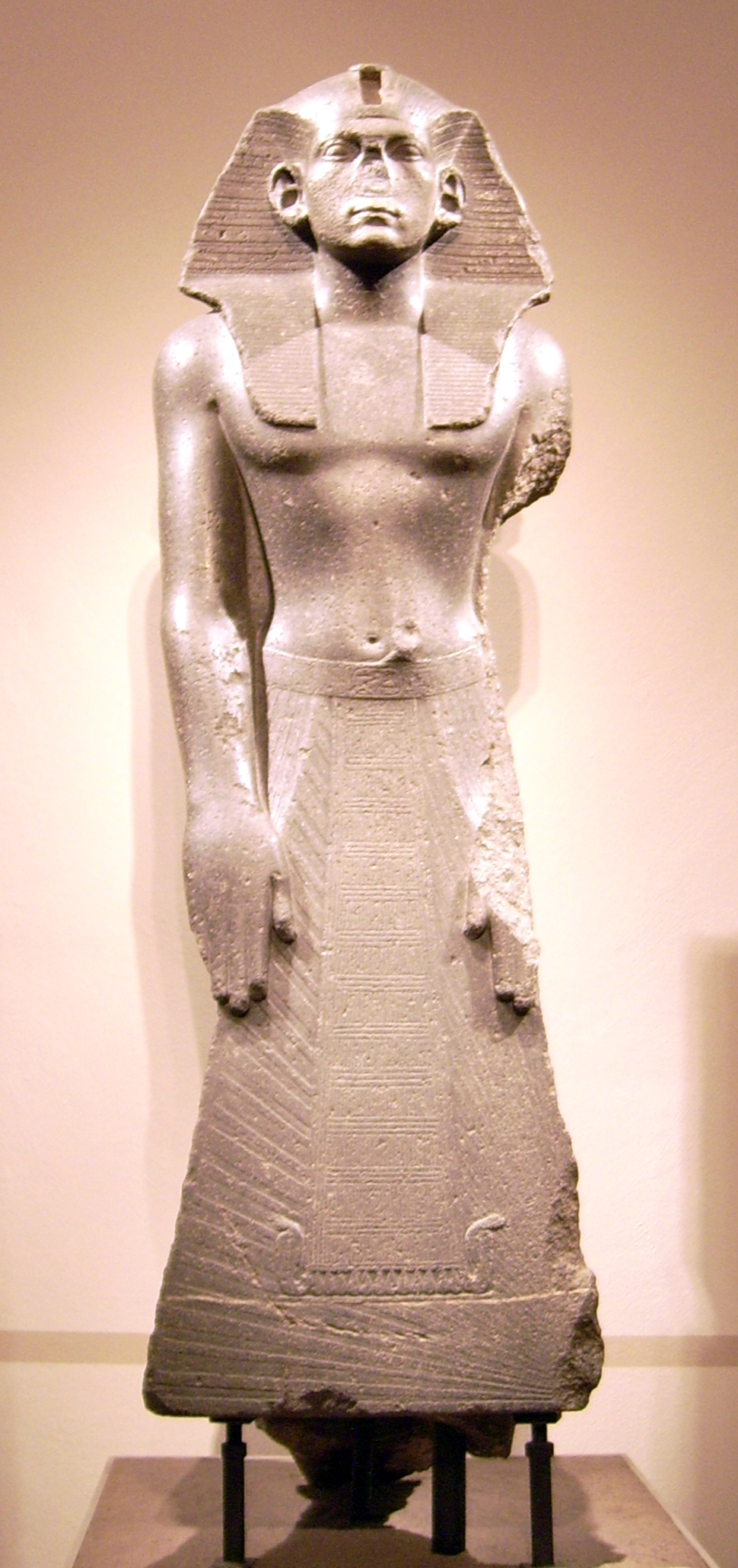 Beterstatue Amenophes' III.